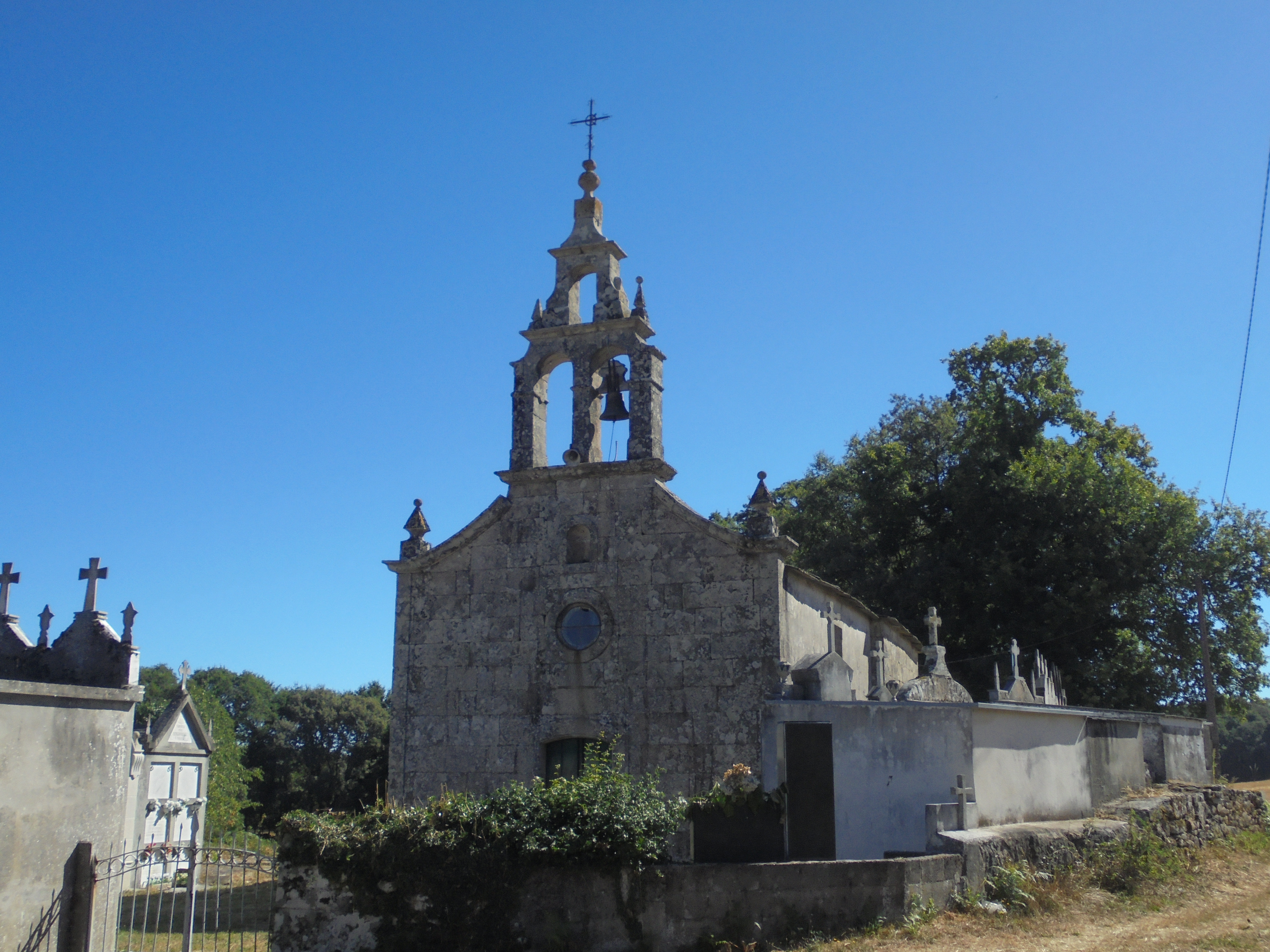 Igrexa parroquial de San Salvador do Outeiro das Camoiras ( Lugo)